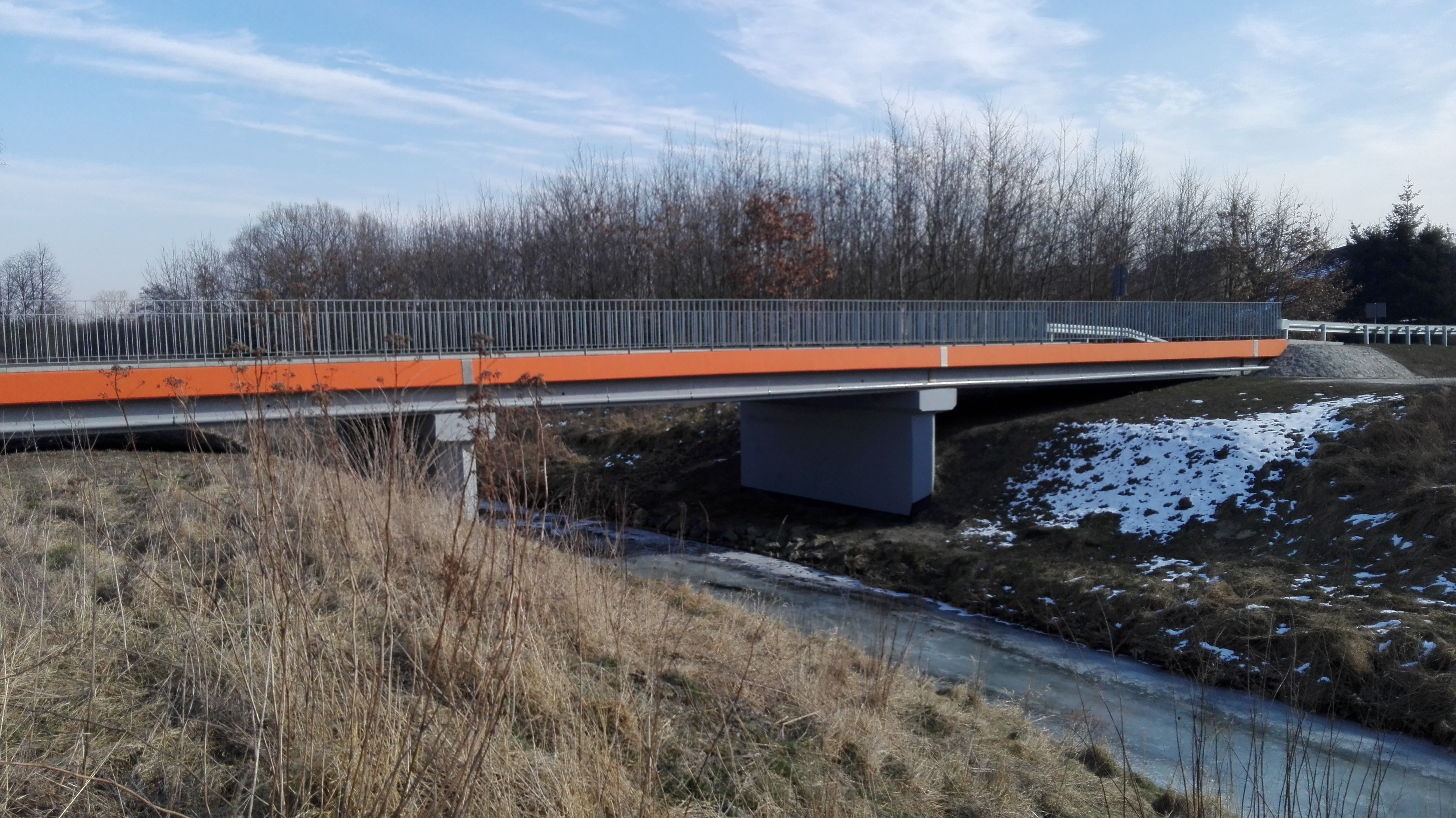 Skrzypiec, most na rzece Prudnik